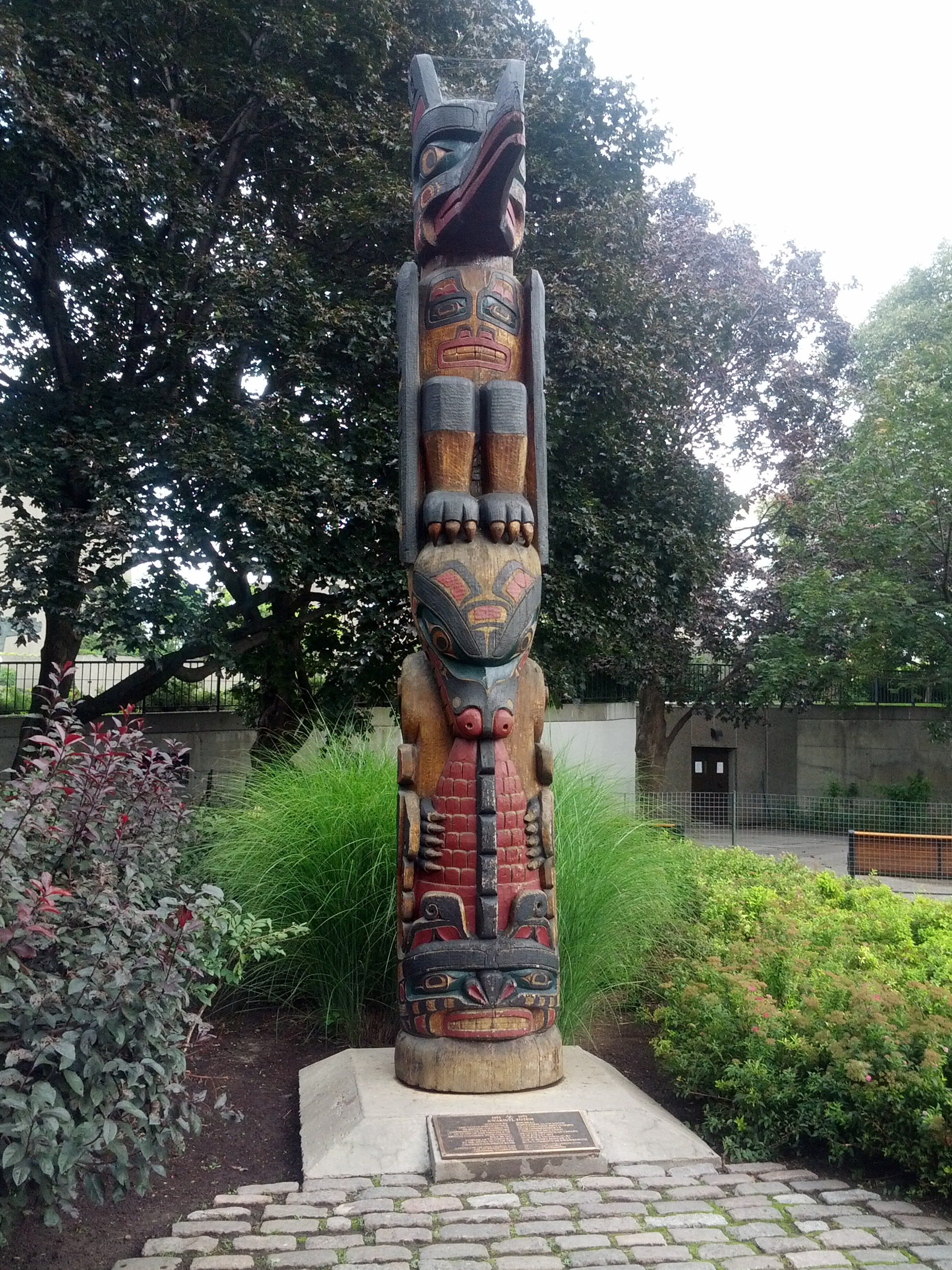 Monumento em Ottawa.